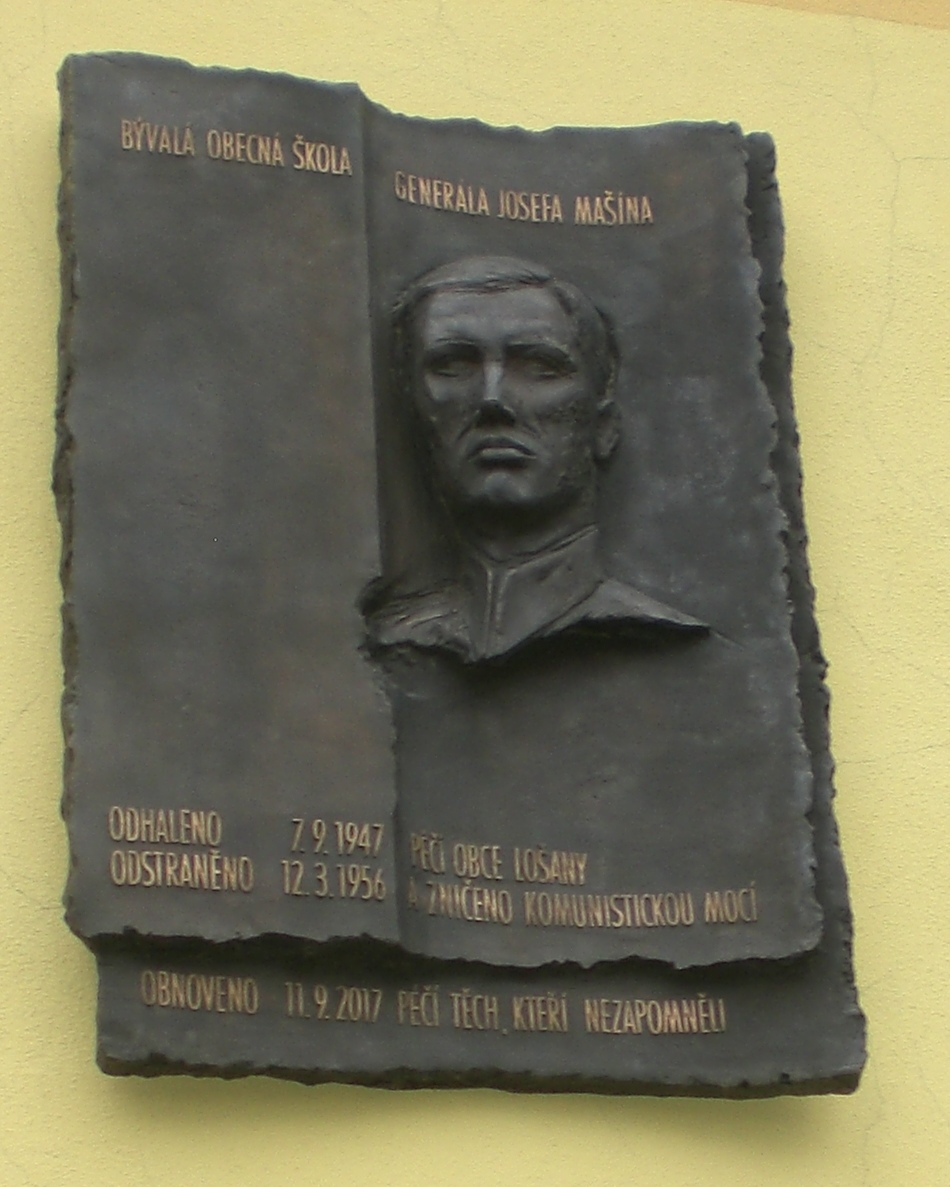 Dne 11. září 2017 byla na budově místního obecního úřadu v Lošanech odhalena pamětní deska. Ta připomíná, že dne 7. září 2017 ulynulo 70 let od doby, kdy v této budově tehdy sídlící obecná škola byla pojmenována po generálu Josefu Mašínovi - "Obecná škola generála Josefa Mašína". Škola nesla toto označení v letech 1947 až 1956. V roce 1956 byla tato deska z budovy odstraněna a dále se nesmělo používat toto její pojmenování. Nově odhalená pamětní deska na budově obecního úřadu je dílo kolínského akademického sochaře Jaroslava Hylase.